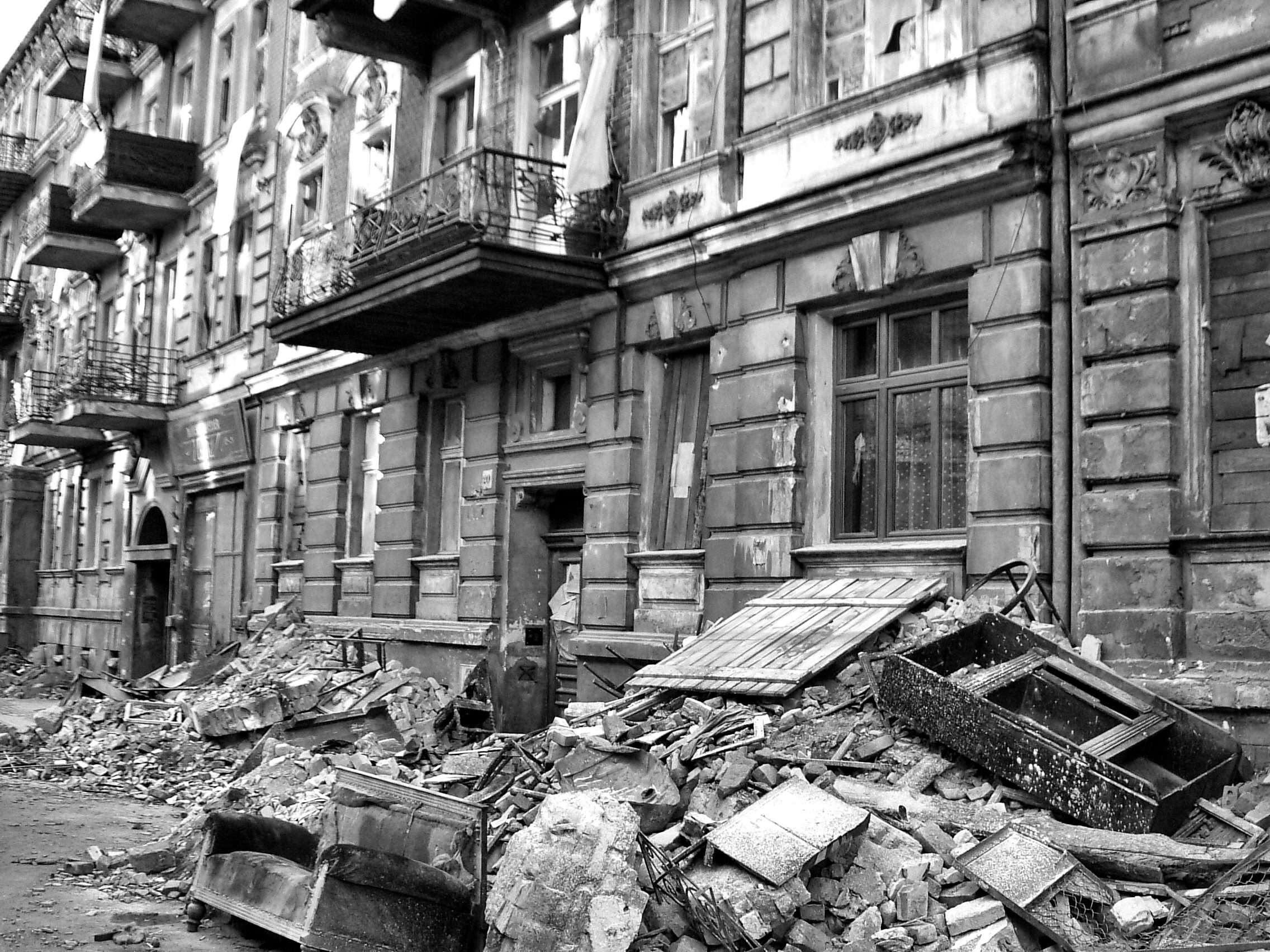 Legnica imatate Berlin during IIWW.